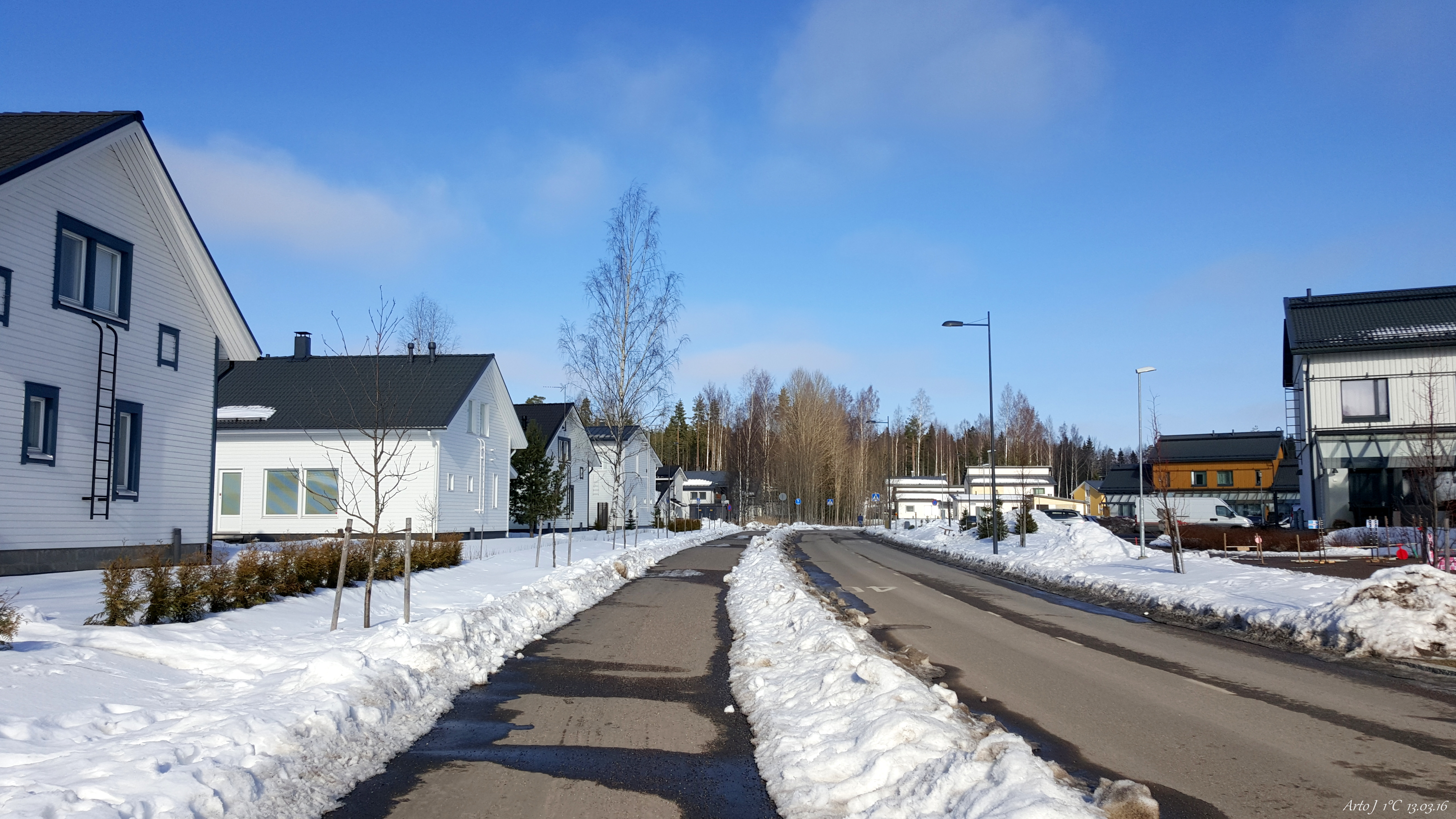 Springlike street view